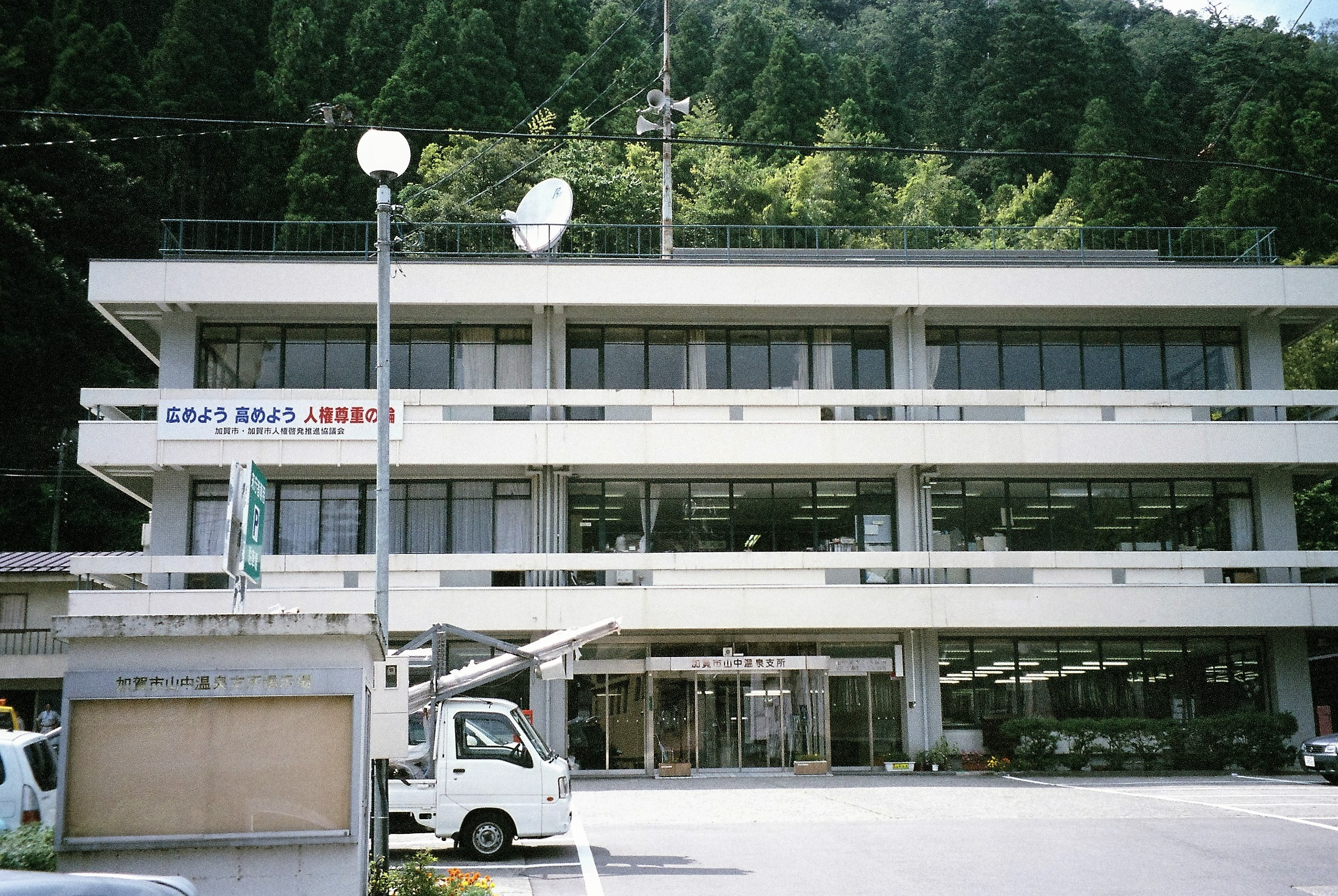 加賀市役所山中温泉支所（旧山中町役場）